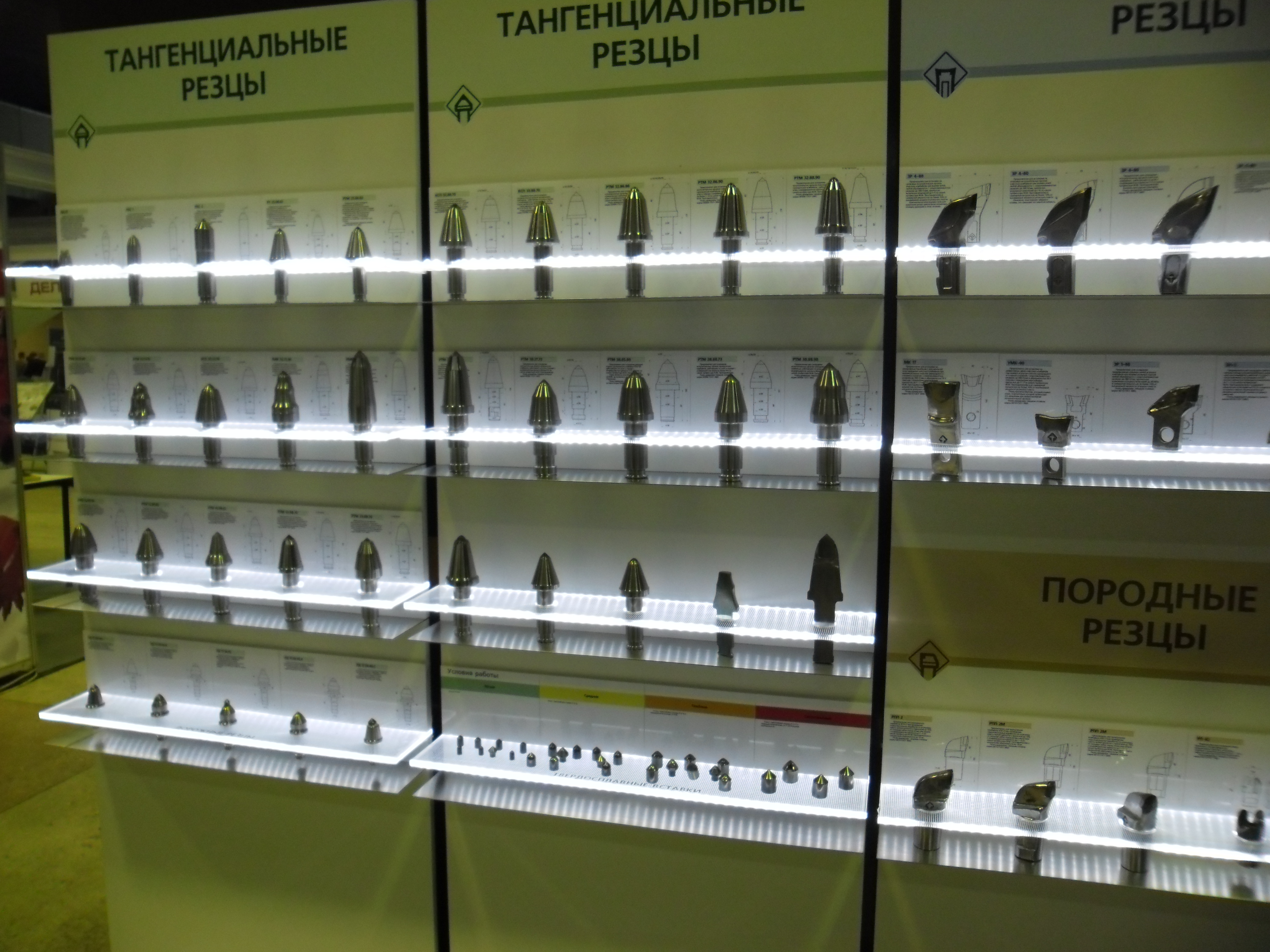 Різці: Фото